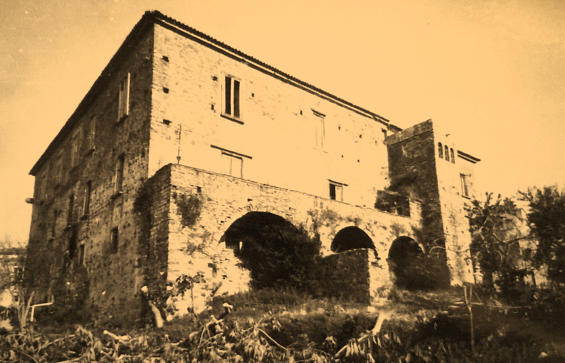 I 2 lati terminavano entrambi con una Torre , schema tipico longobardo; di quella caduta sono visibili gli attacchi e le fondamenta; murata nell' '800 partiva da qui una galleria che portava nelle campagne per mettere in salvo da eventuali assedi o altri pericoli .